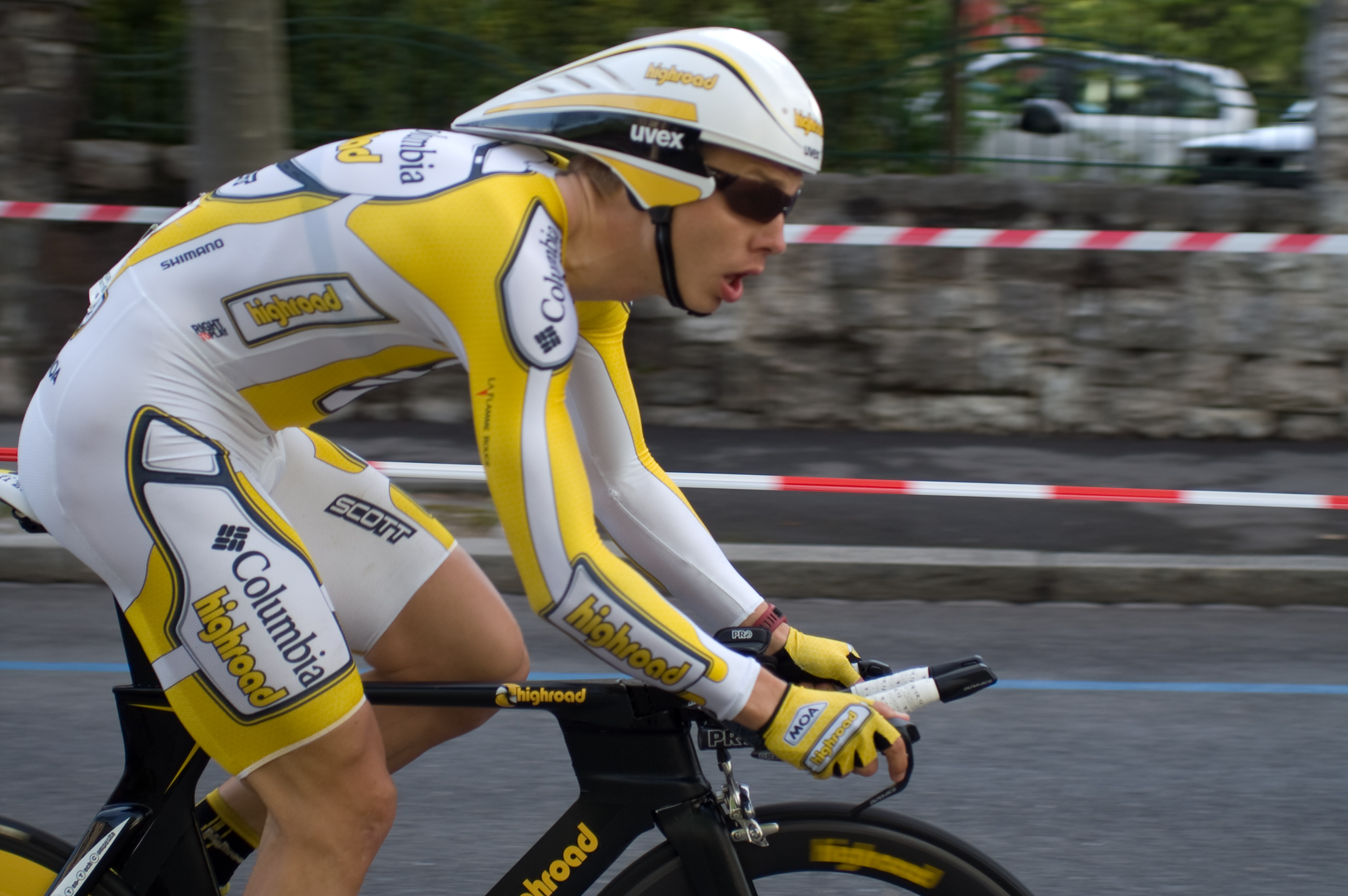 Tony Martin au Tour de Romandie 2009 - prologue